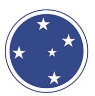 Escudo do Cruzeiro em 1942